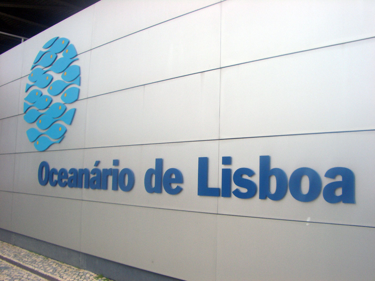 Entrada del Oceanario de Lisboa.